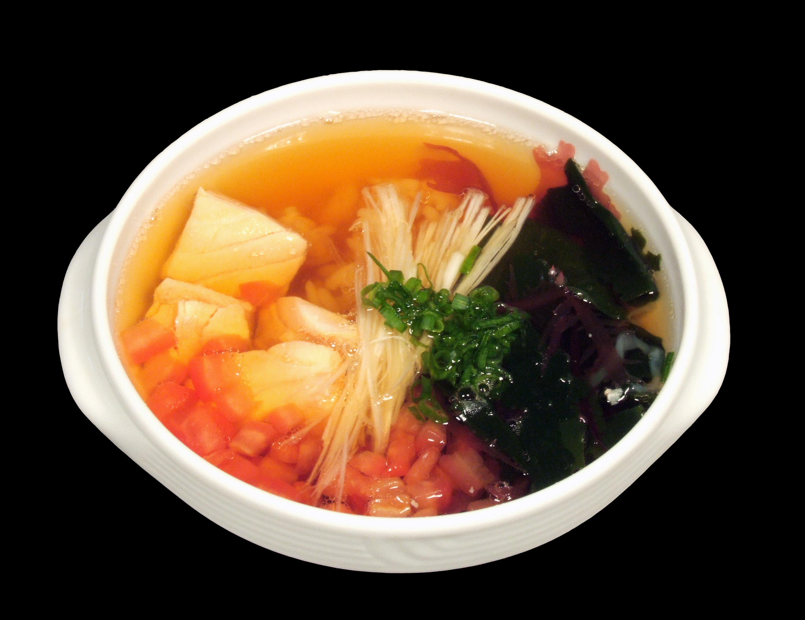 Soup, japan dish, японская кухня, суп